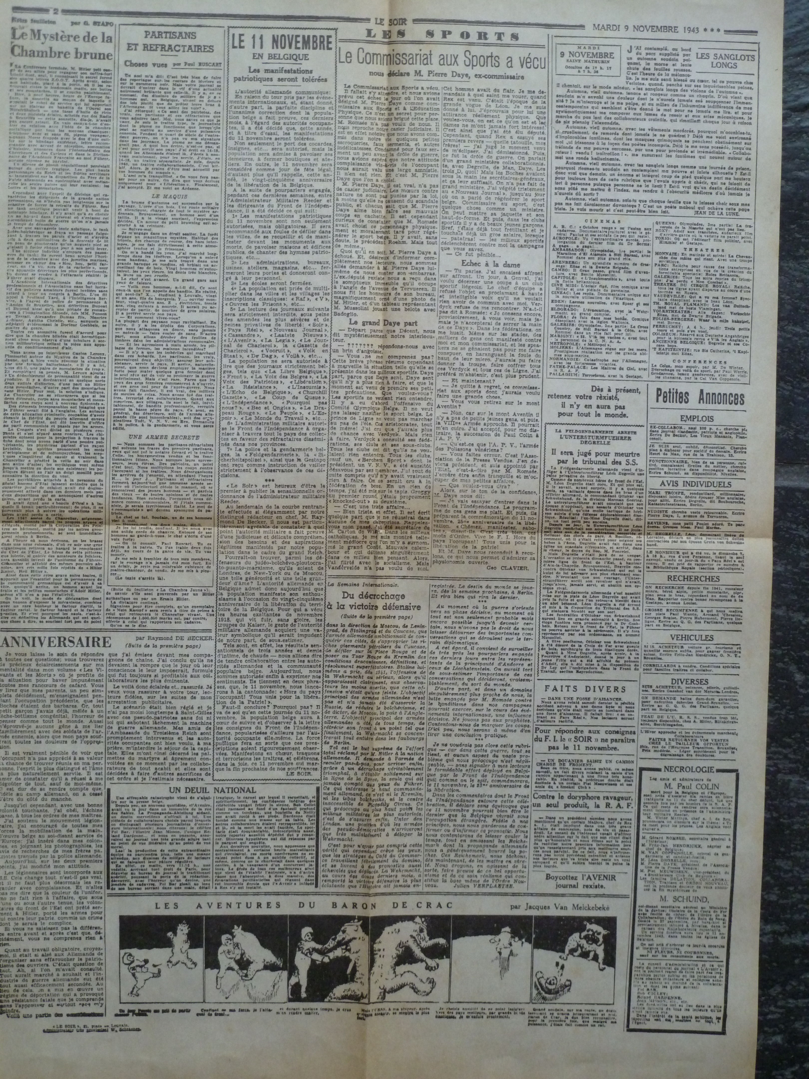 Le Faux Soir publié par la résistance belge, le 9 novembre 1943; page 2